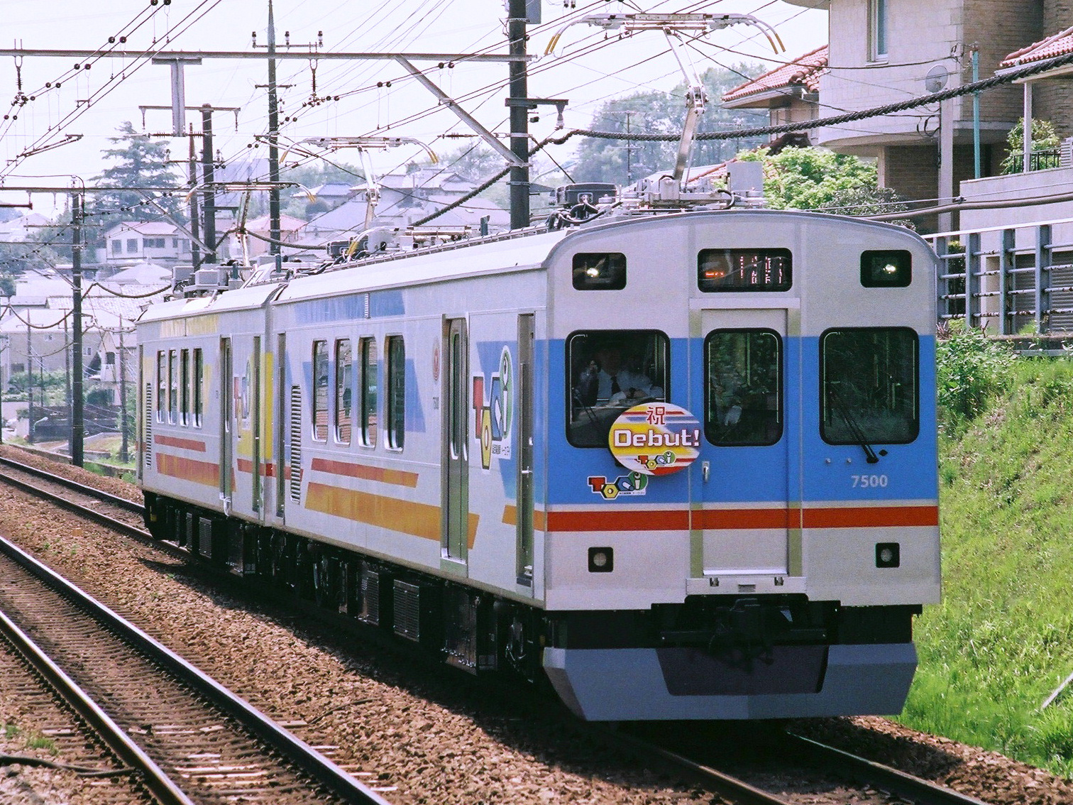 東急デヤ7500+デヤ7550(TOQ i)。2012年5月6日の登場記念公開試運転、つくし野駅にて。